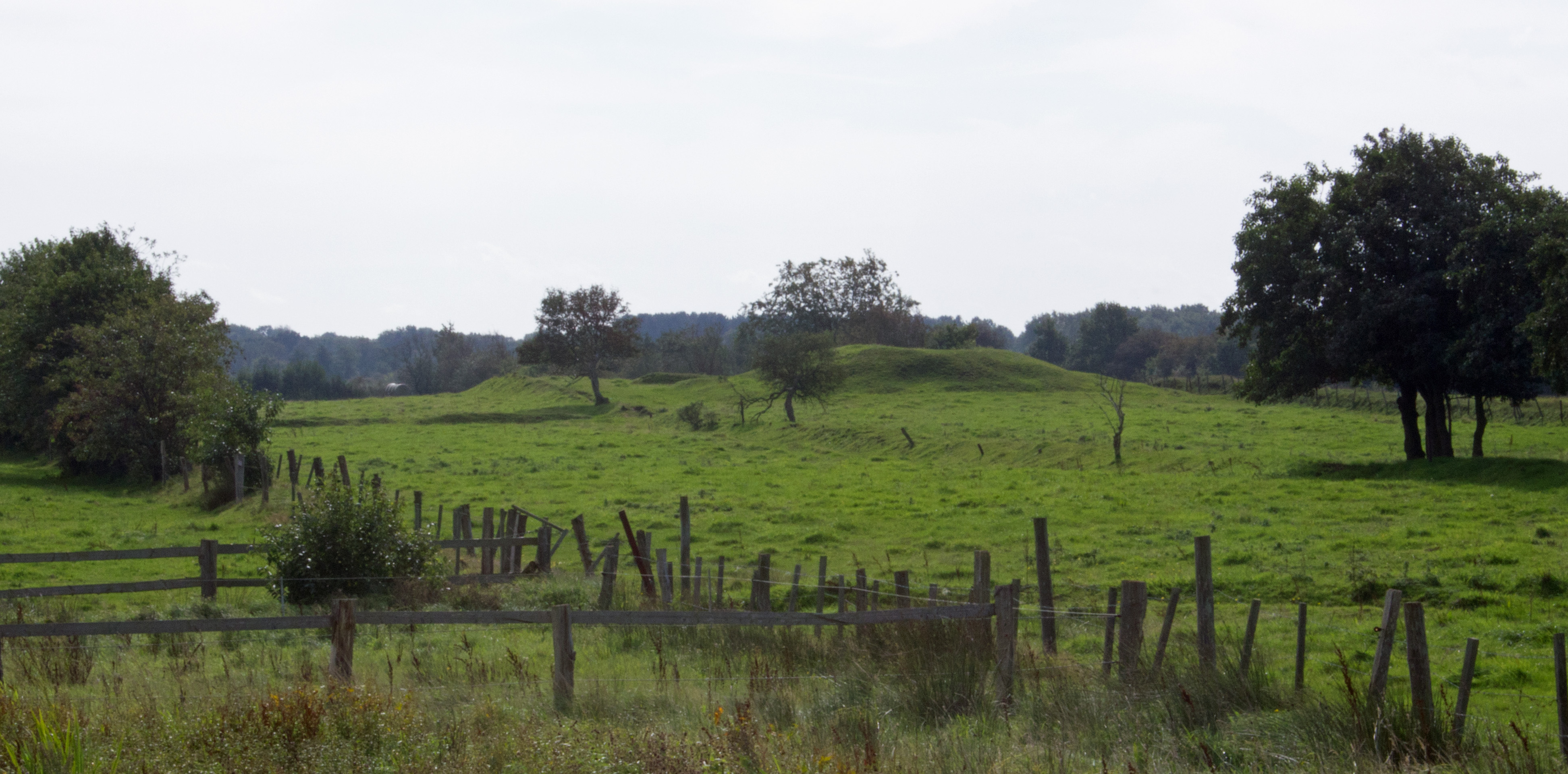 Grabhügel Twellberg [Bearbeiten] Den Namen Twellberg (Zwillingsberg) hat der drei Meter hohe Hügel aufgrund eines zweiten Hügels, der Anfang des 20. Jahrhunderts der Kultivierung zum Opfer fiel. Im 17. Jahrhundert waren die beiden Hügel (in den Prozessakten noch mit einer Höhe von fünf Metern angegeben) umstrittene Grenzmarkierung zwischen den Bauernschaften Duhnen und Sahlenburg. Bei der 1948 erfolgten Ausgrabung wurden von Dietwald Brandt die Steinpackung eines Baumsarges und dessen Reste gefunden. Neben dem Leichenbrand lagen als Grabbeigaben zwei Armreife, ein Fingerringfragment, ein Messer, eine Nadel und ein bronzener Gürtelbuckel. Den mittelbronzezeitlichen (um 1200 v. Chr.) Funden zufolge wurde hier eine Frau bestattet.